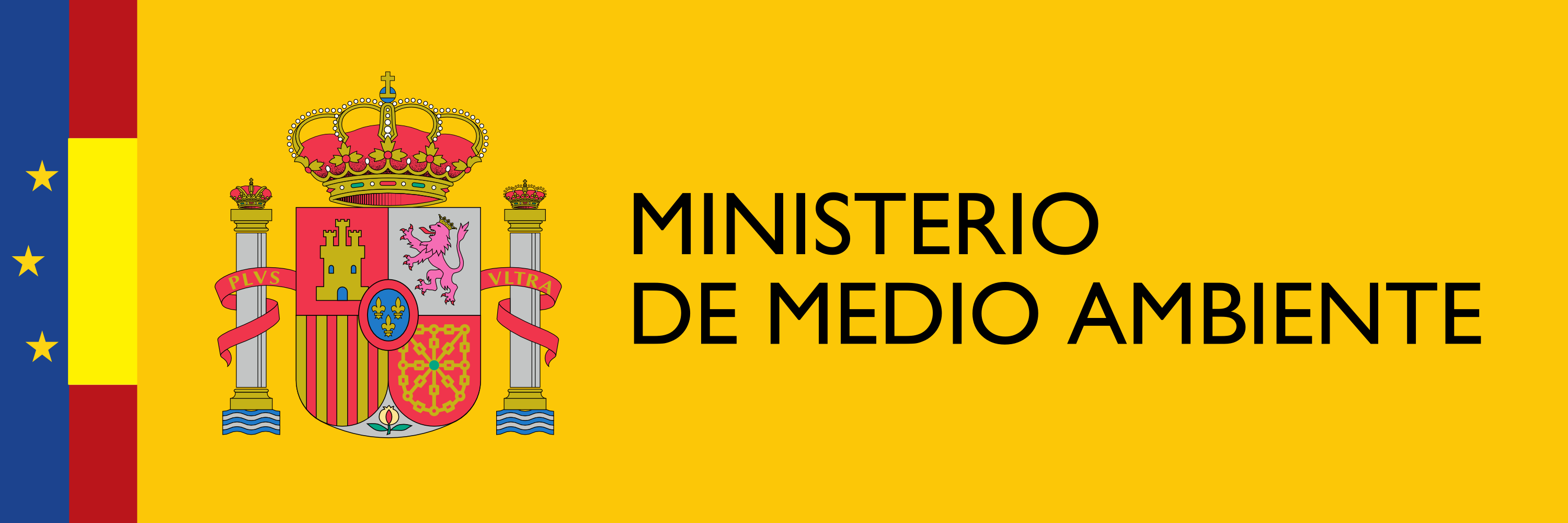 Logotipo del Ministerio de Medio Ambiente